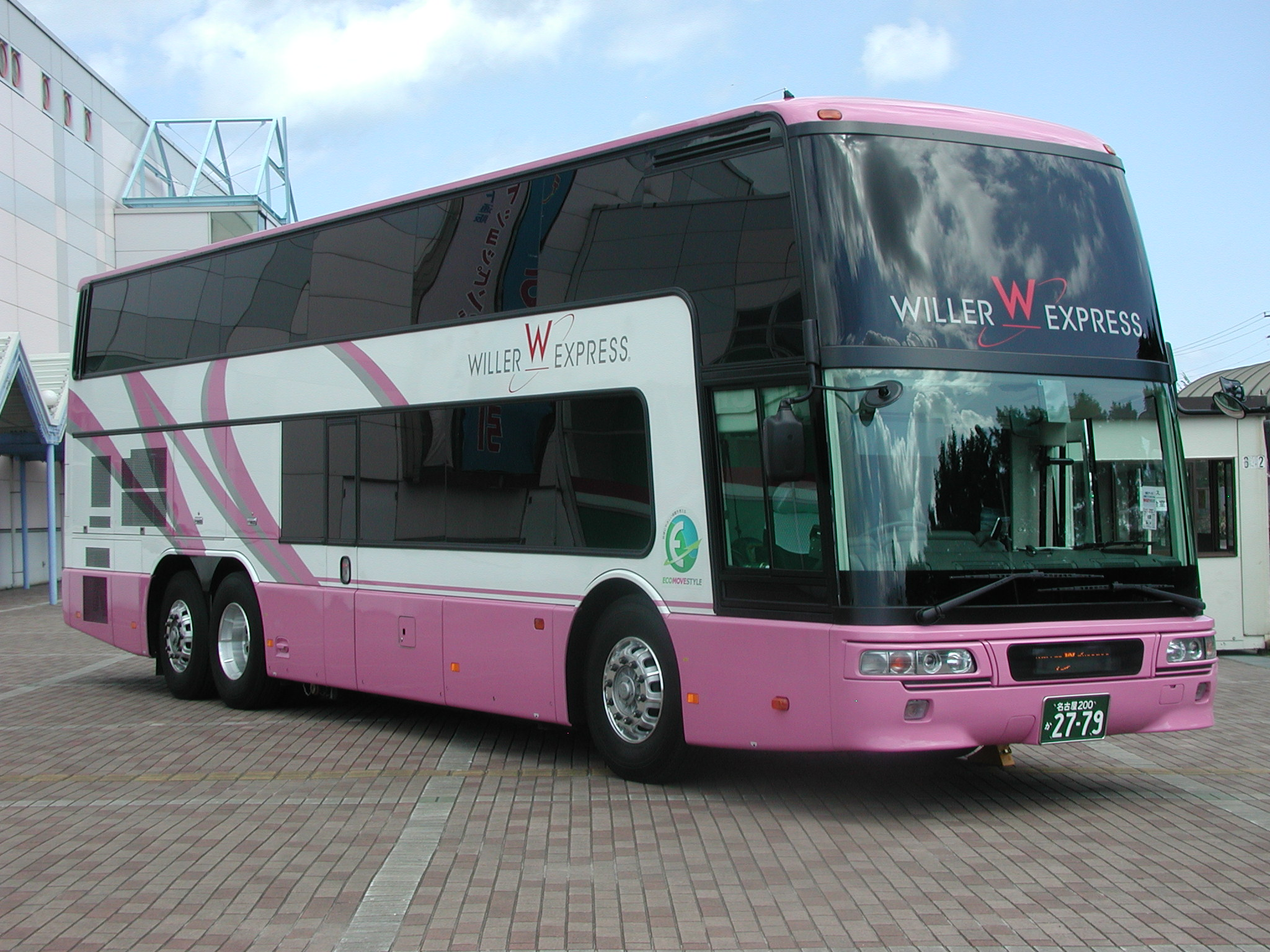 WILLER BUS（ウィラーバス）：『WILLER EXPRESS』バリュー（2階建て車両：三菱ふそう・エアロキングBKG-MU66JS）